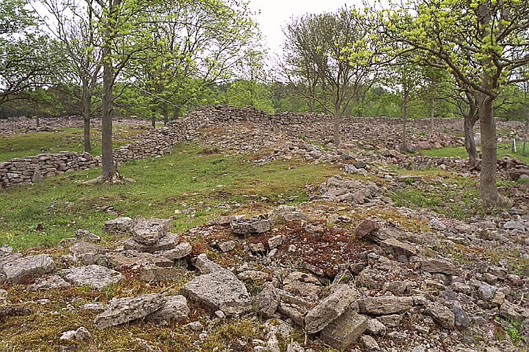 Fornborg Motiv: Träbyborg Nyckelord: Riksintressen, Världsarv Kategori: Fornborg Fornborg.